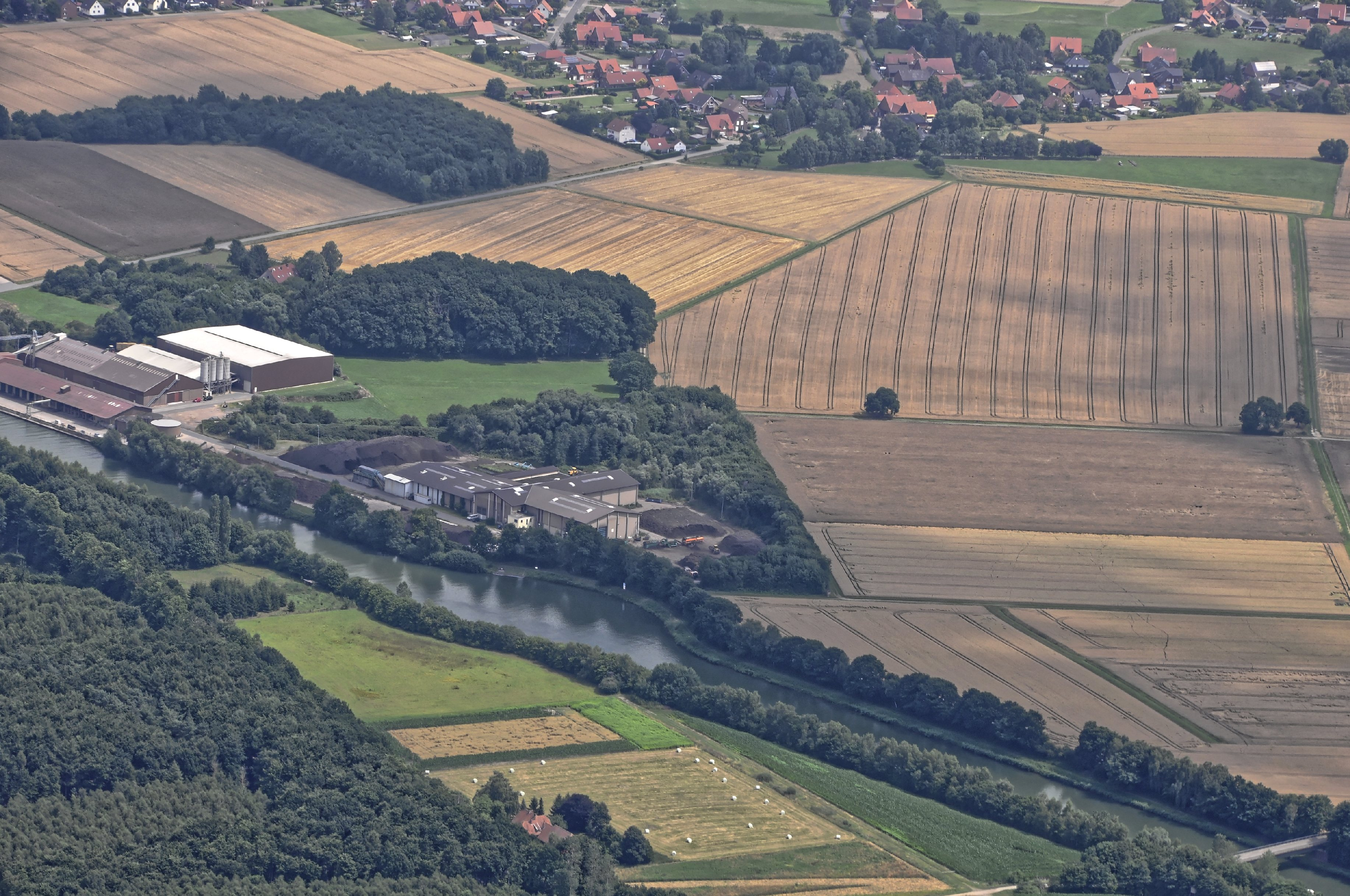 Bilder vom Flug Nordholz-Hammelburg 2015: Hafen Wiehagen auf dem Gebiet der Gemeinde Niedernwöhren im Landkreis Schaumburg, Niedersachsen.